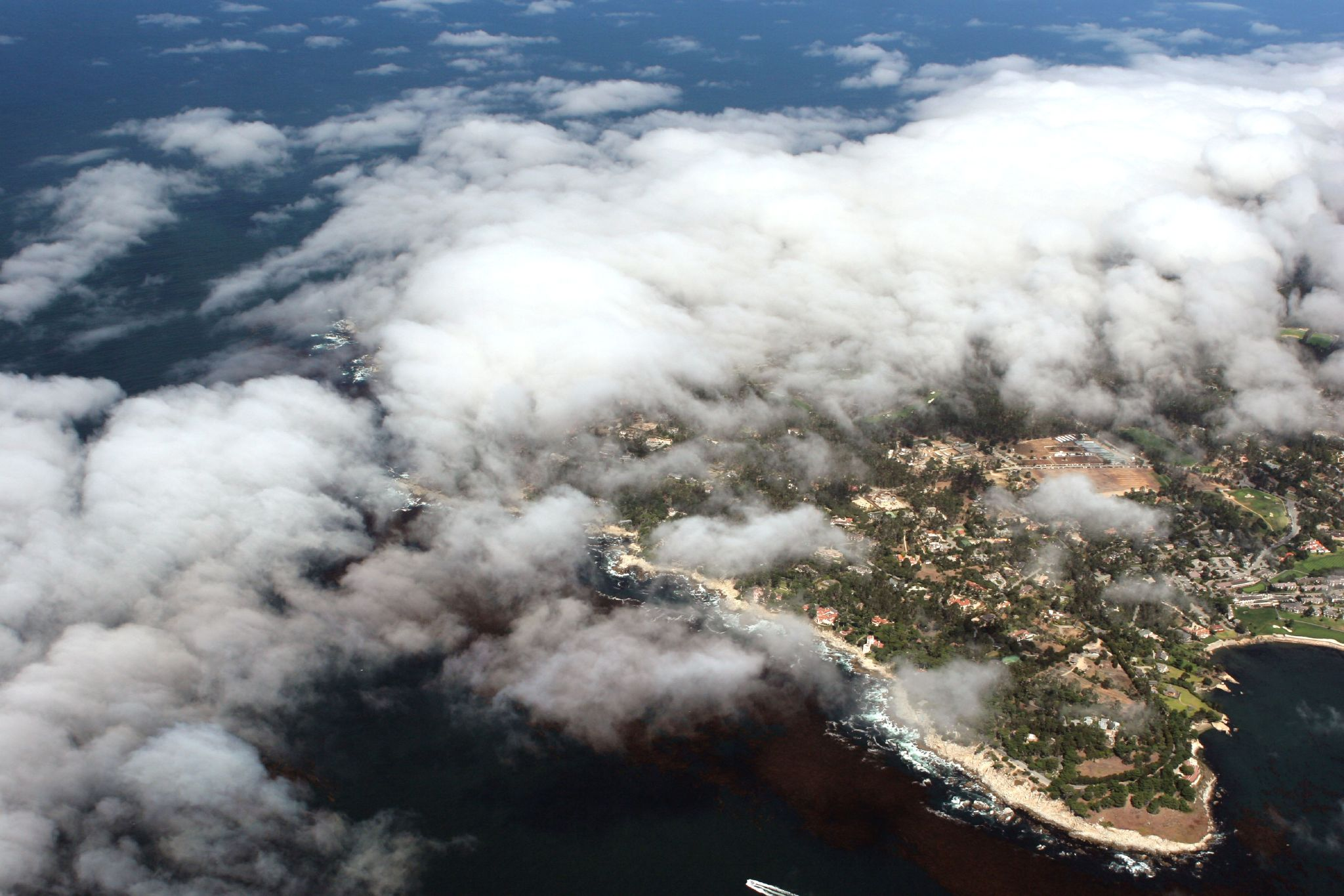 Penisola di Monterey, California, UsaMonterey Peninsula